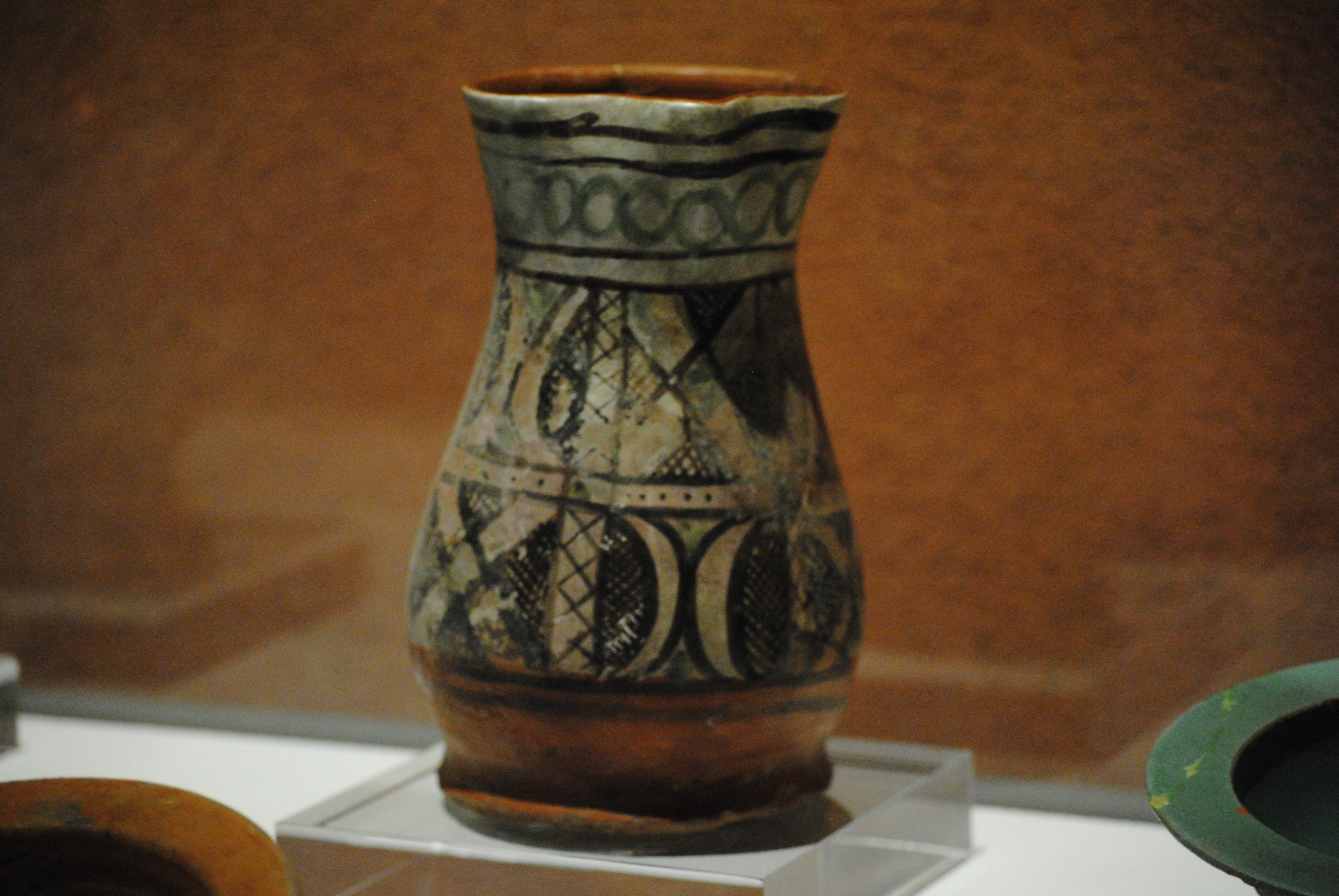 Boccale in maiolica arcaica di Pisa - databile tra la seconda metà XIII - inizi XIV secolo (proveniente dalla collezione Tongiorgi, Pisa) - Museo nazionale di San Matteo.